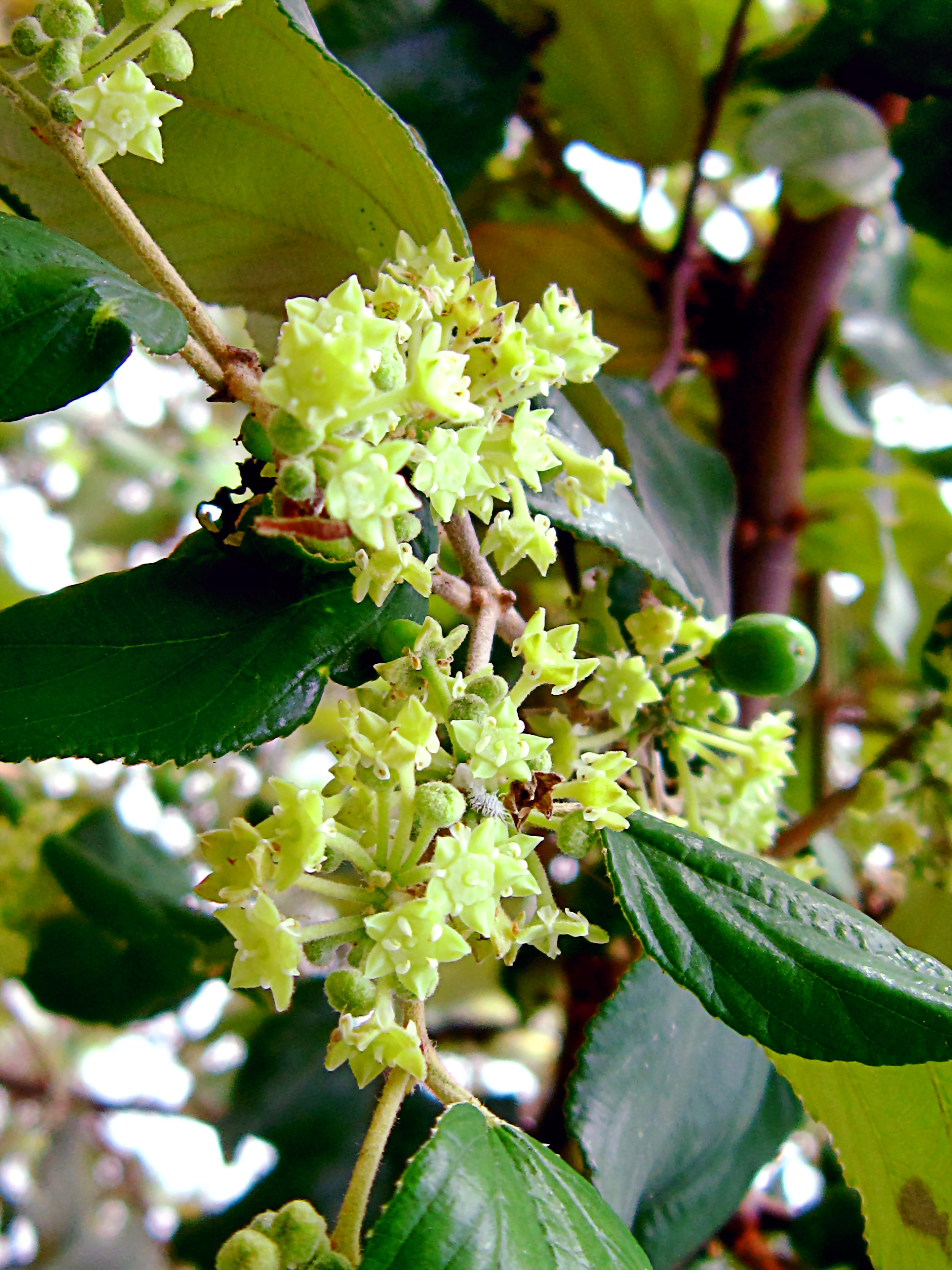 Hoa táo ta hay táo chua, là loại cây ăn quả có tên khoa học Ziziphus mauritiana, thuộc về họ Táo (Rhamnaceae).